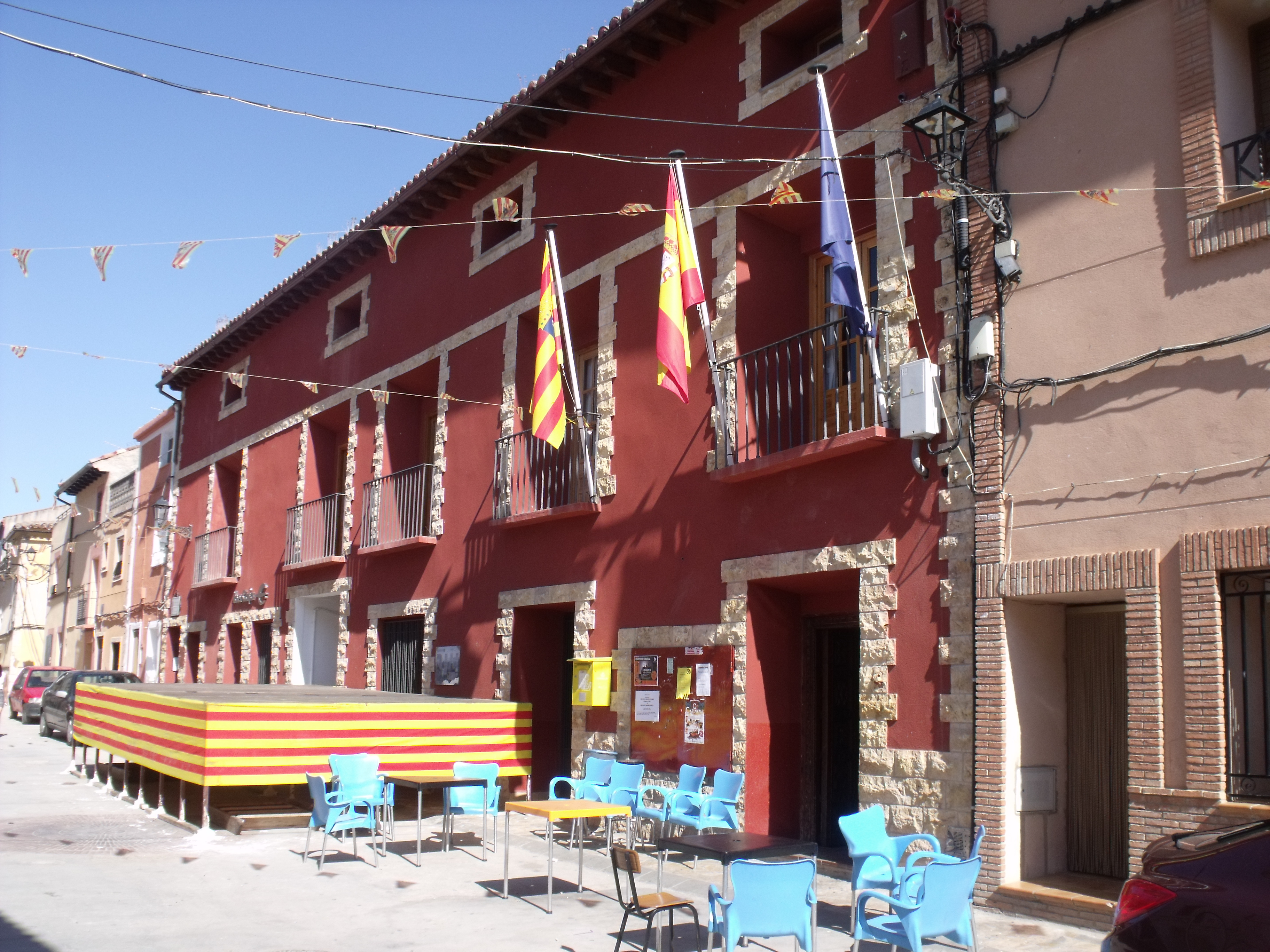 Fachada principal a la calle mayor